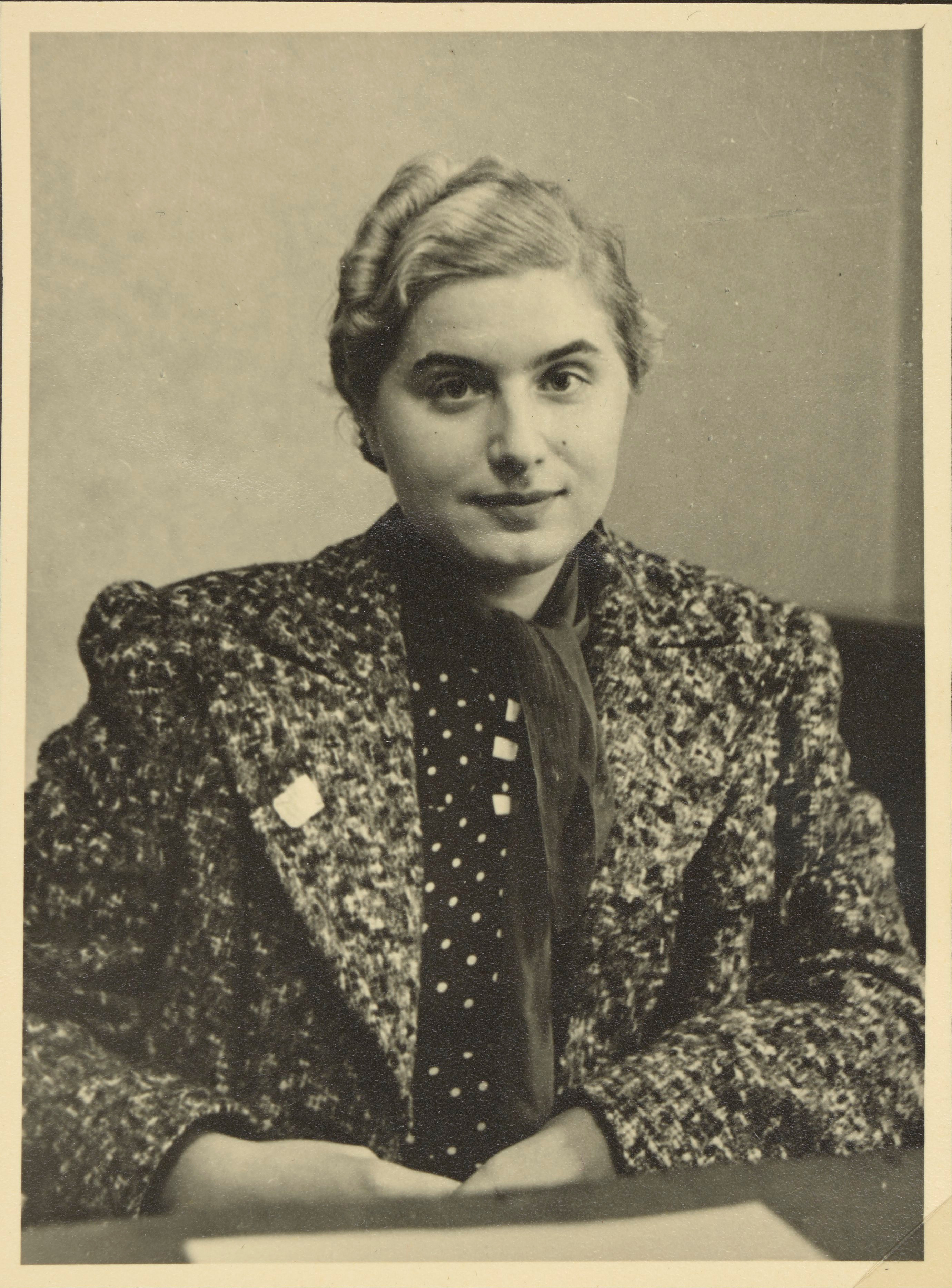 Hanna Muszyńska Hoffmanowa